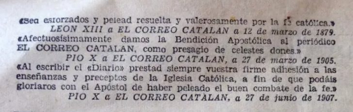 Bendiciones de varios pontífices a El Correo Catalán